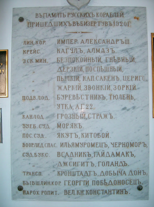 Список русских кораблей находится в храме